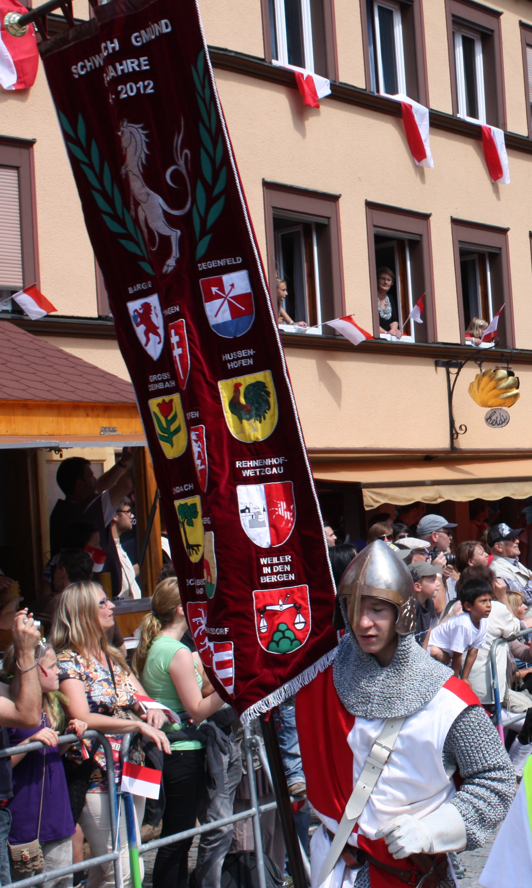 Schwäbisch Gmünd. Ein Banner mit den Wappen der Stadtteile beim Umzug der Staufertage 2012.